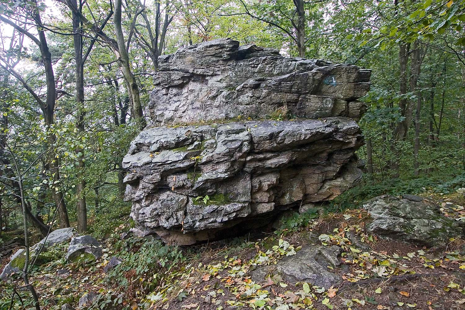 Peperek - skála na vrcholu